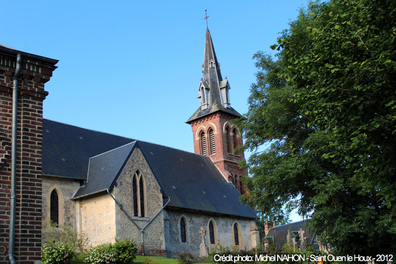 Saint-Ouen-Le-Houx 14140 Calvados, Basse Normandie.